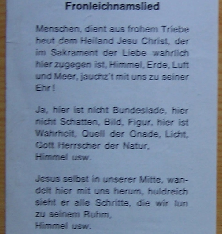 Liedzettel aus der Pfarrei St. Nikomedes Borghorst, OT d. Kreisstadt Steinfurt, NRW, Germany.. Das Lied wurde auf den diversen Ausgaben der Einlegeblätter für das Gesangbuch mal als Prozesssionslied, mal als Fronleichnamslied bezeichnet. Hier eine Version aus den 1970er bzw. 1980er Jahren. Der Text ist von Verspoell und daher gemeinfrei.